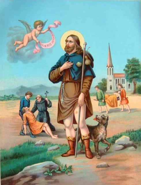 Św.ROCH